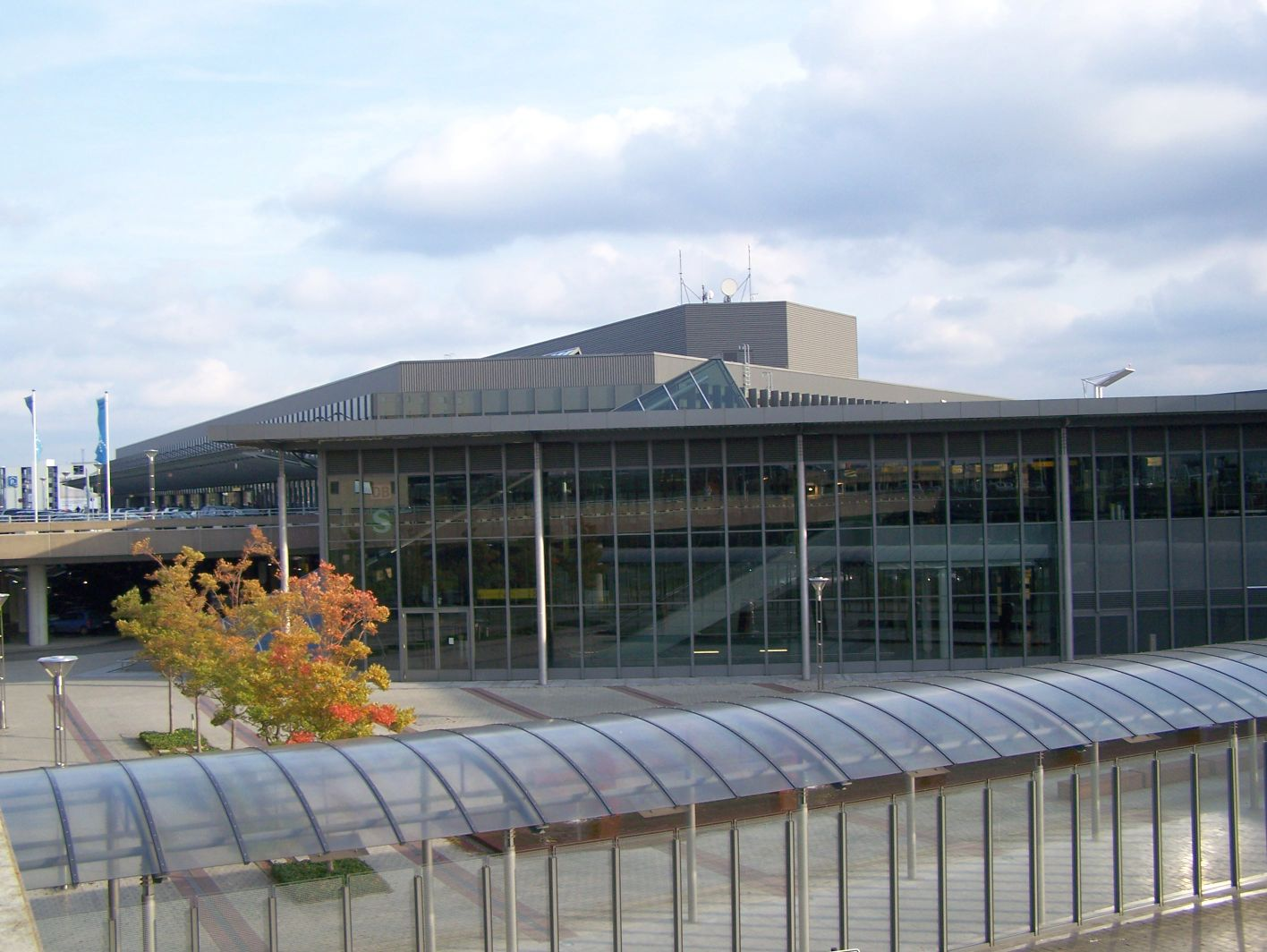 S-Bahn Station Hannover Airport von außen